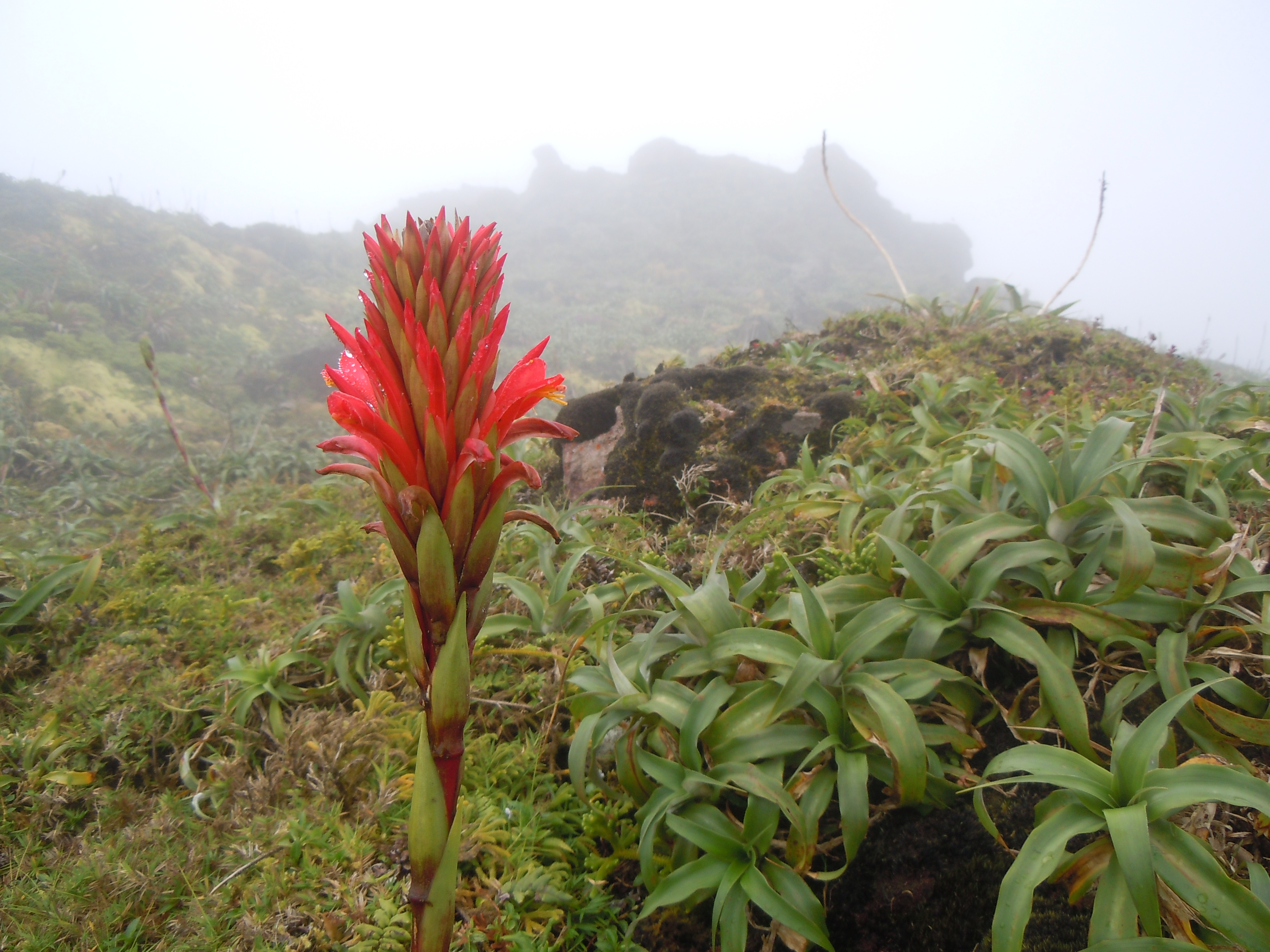 Pitcairnia bifrons, La Soufrière, Guadeloupe